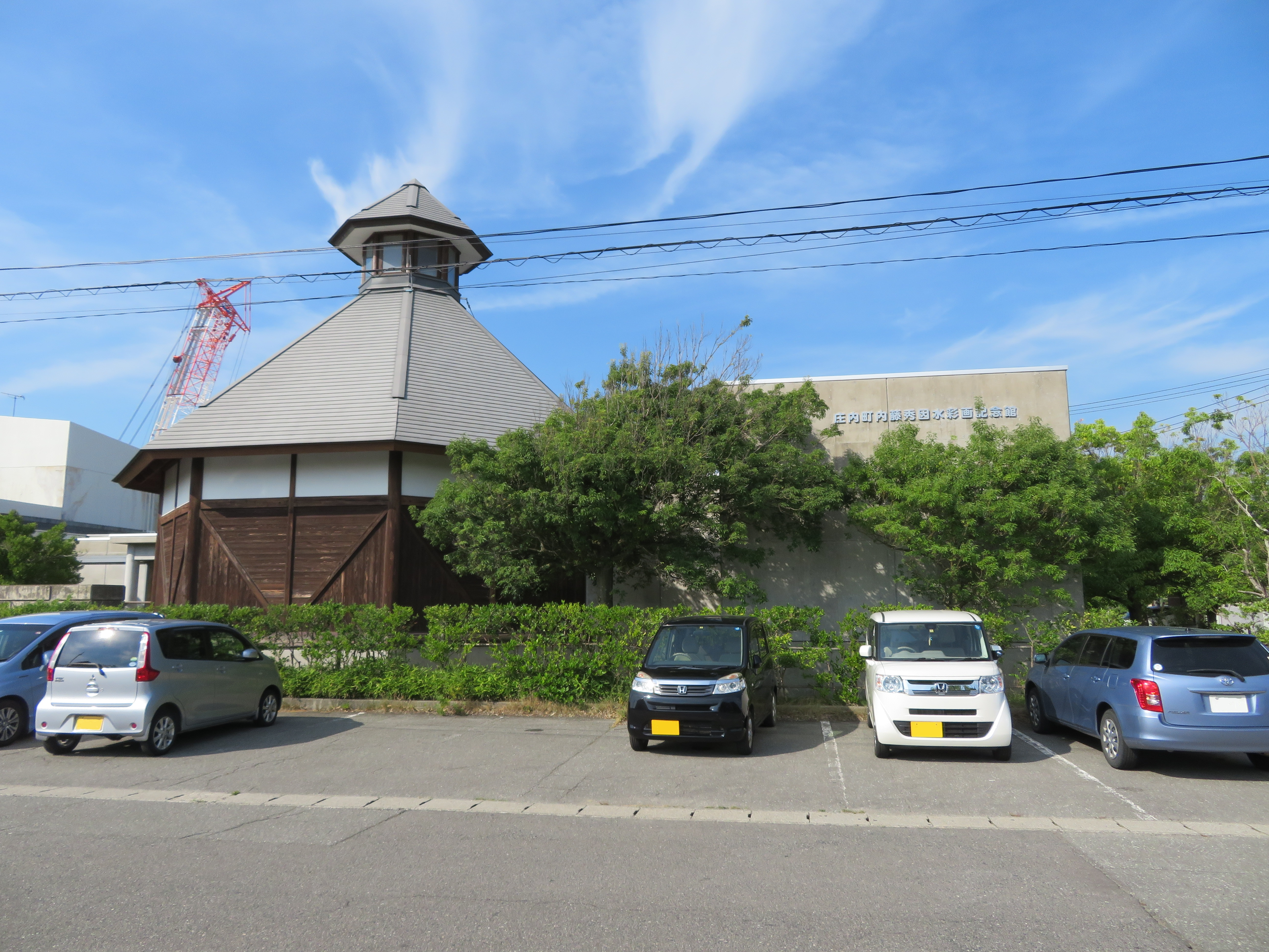 山形県庄内町に所在する庄内町内藤秀因水彩画記念館